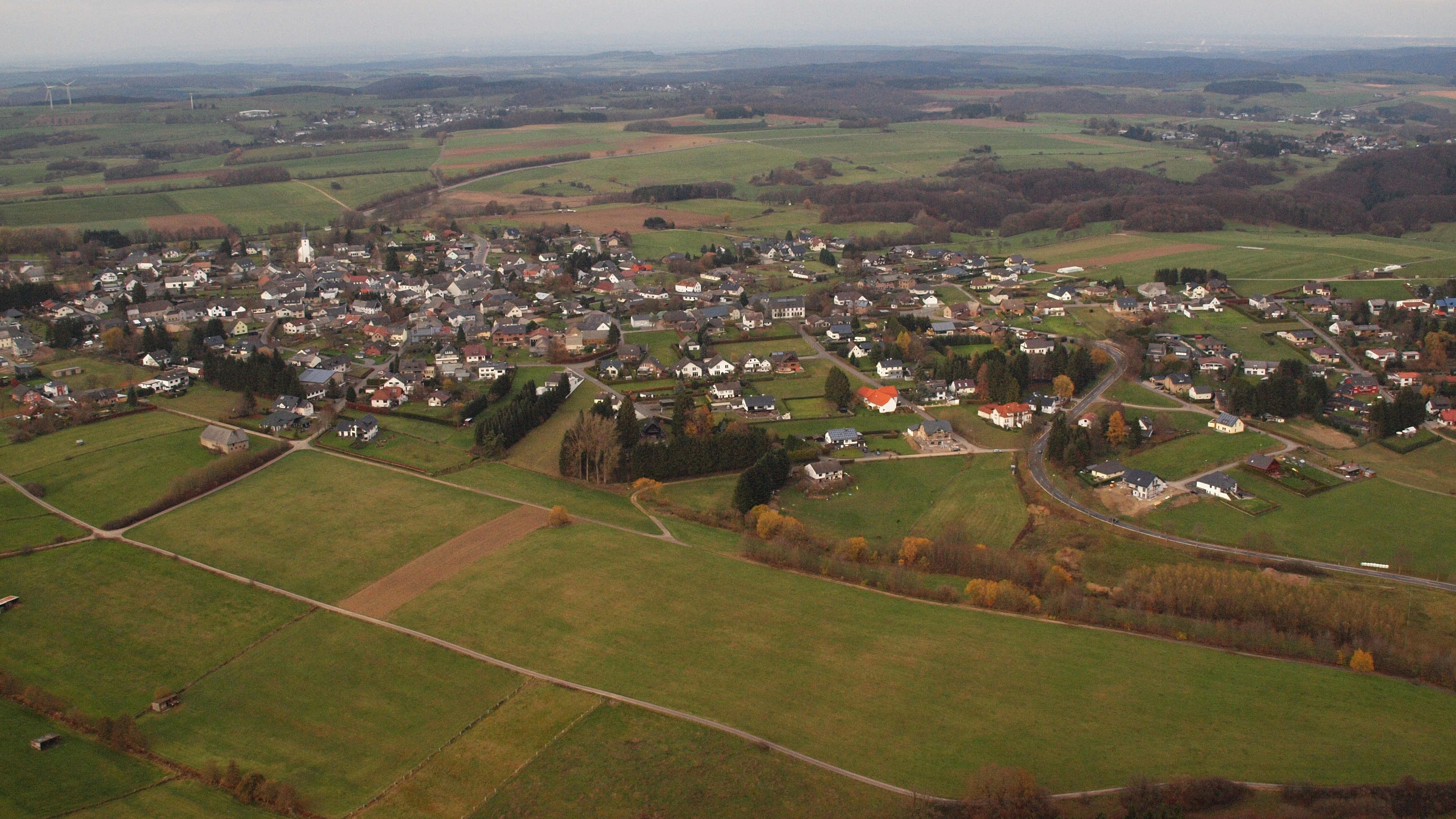 Tondorf, Luftaufnahme (2015)